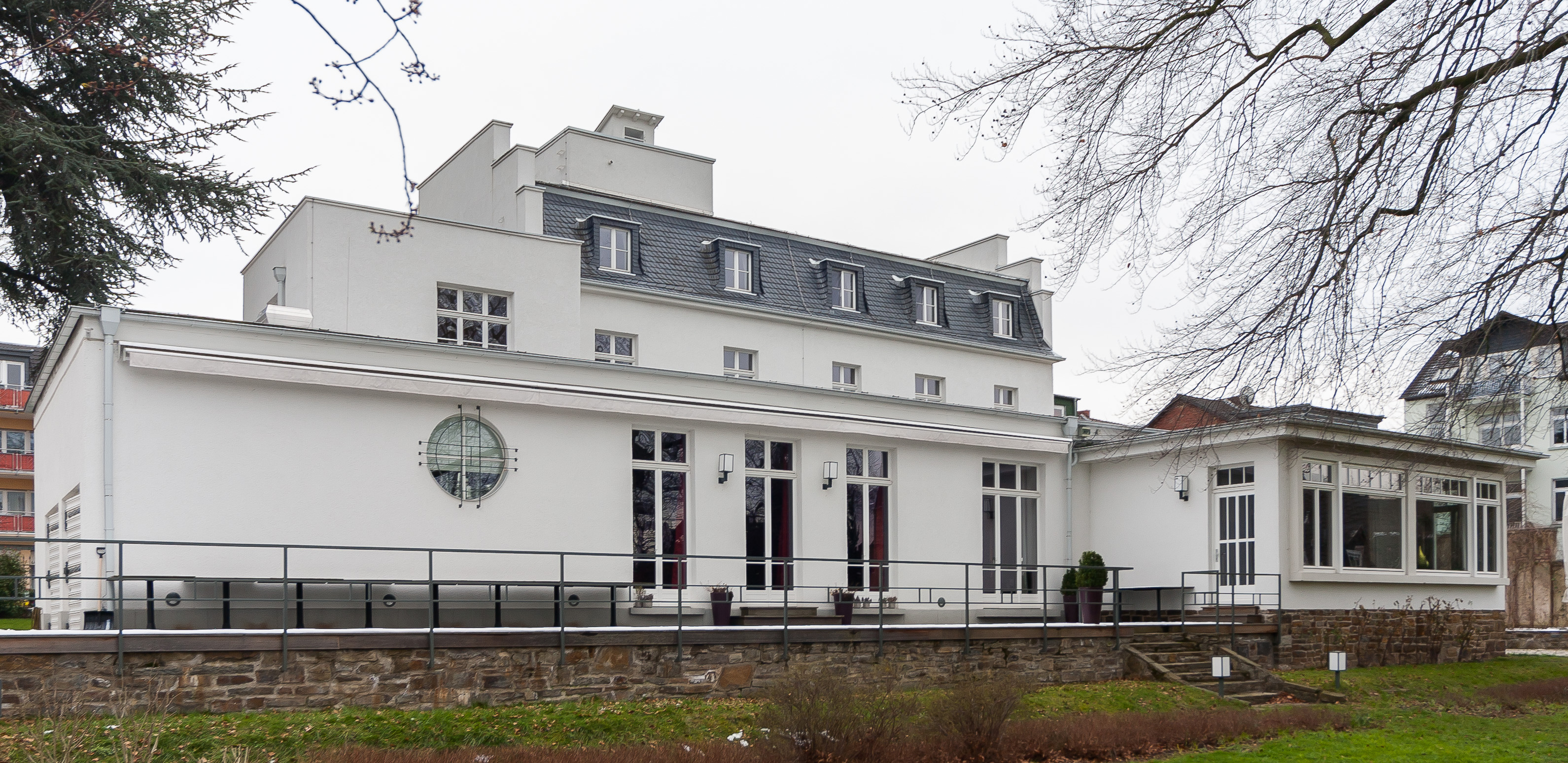 Hauptstraße 330, „Villa Leonhart“, Königswinter